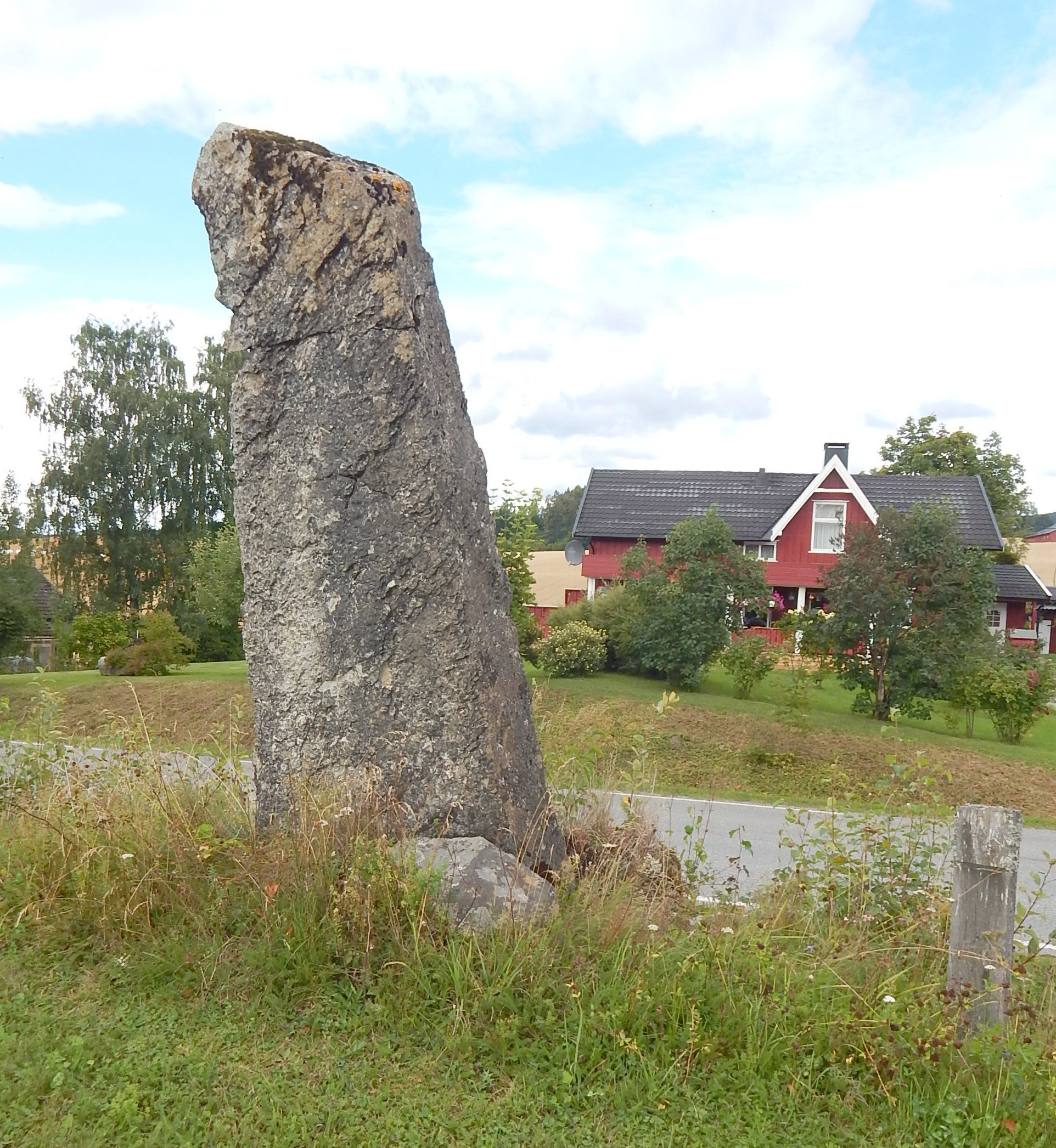 Bautastein ved Mariendal (markert som Samsal av Riksantikvaren)